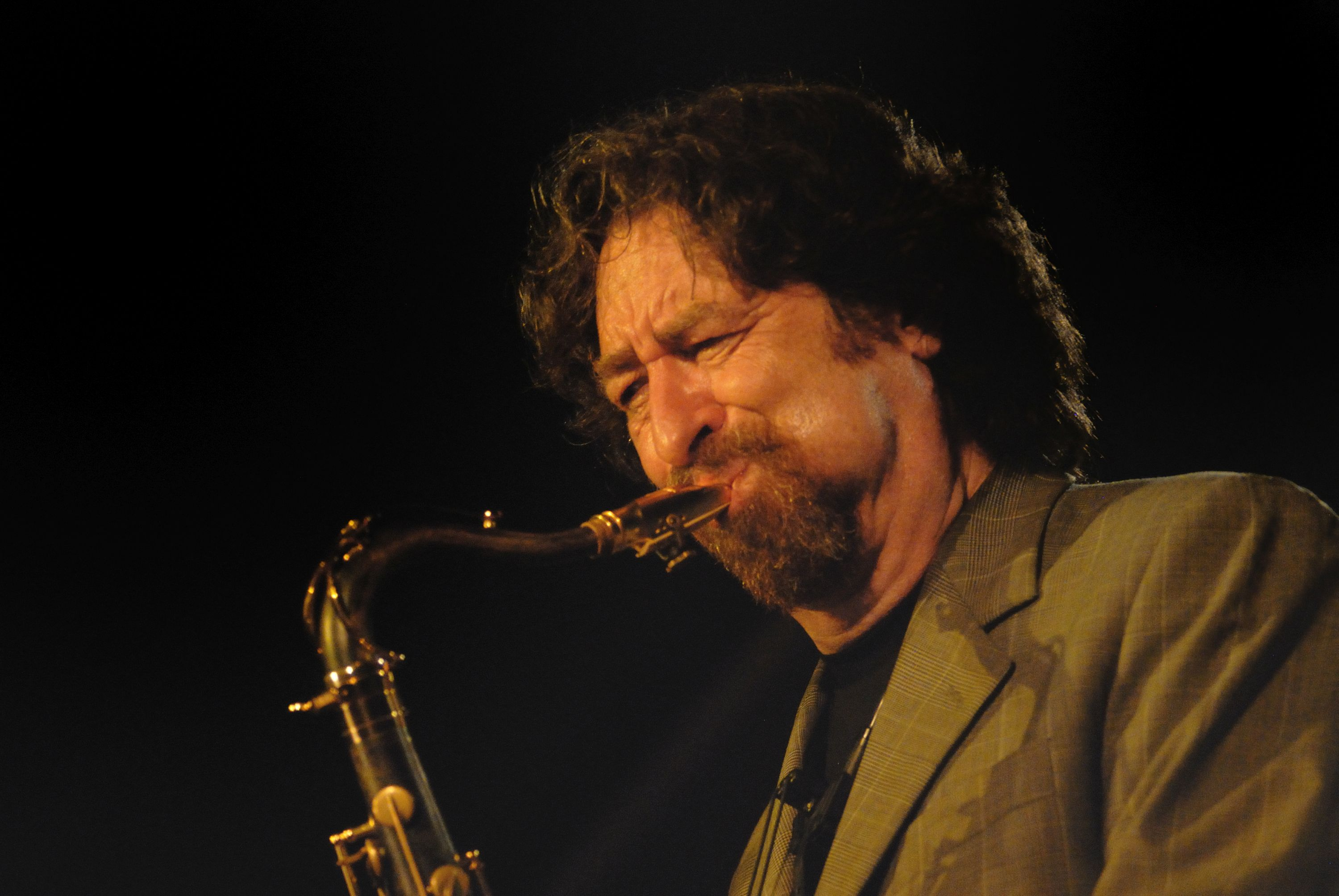 Der Tenorsaxofonist Daniel Guggenheim